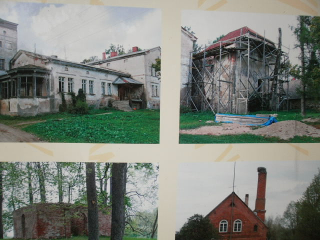 Pildid infotahvlil.